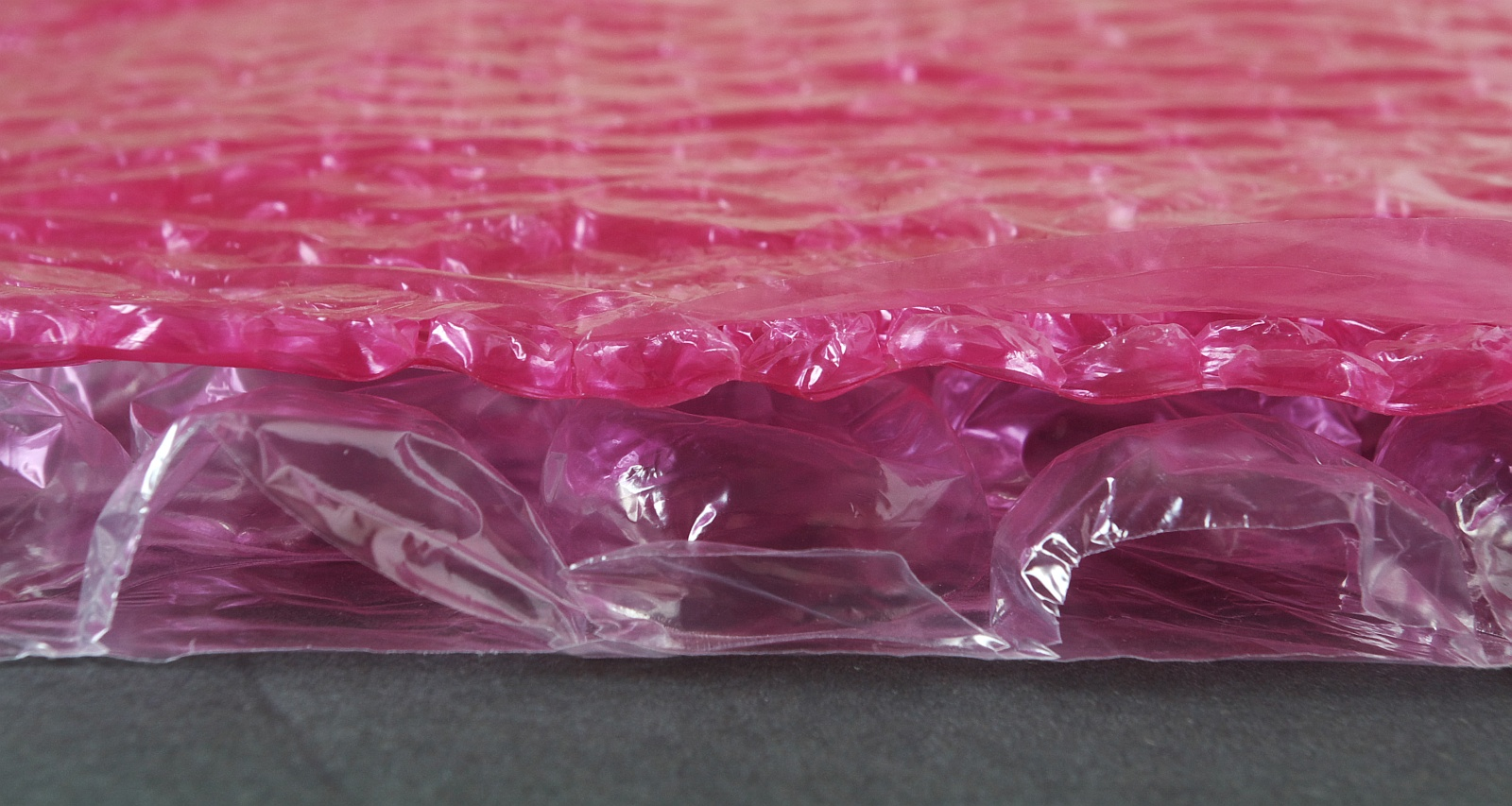 Verschiedene Luftpolsterfolien, oben eine dreilagige Variante, unten die übliche aus zwei Folien bestehende Version.